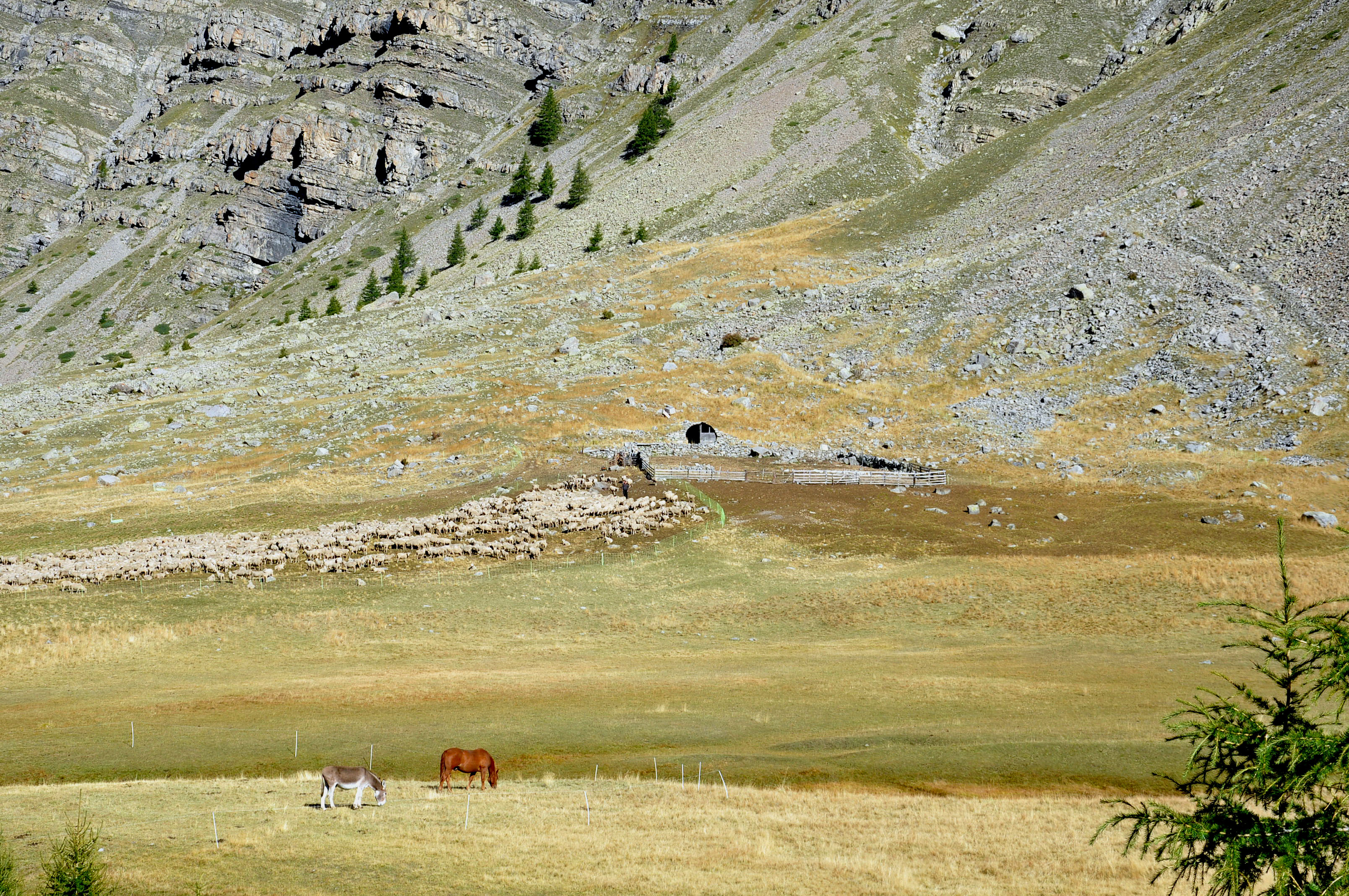 Enclos d'altitude pour moutons